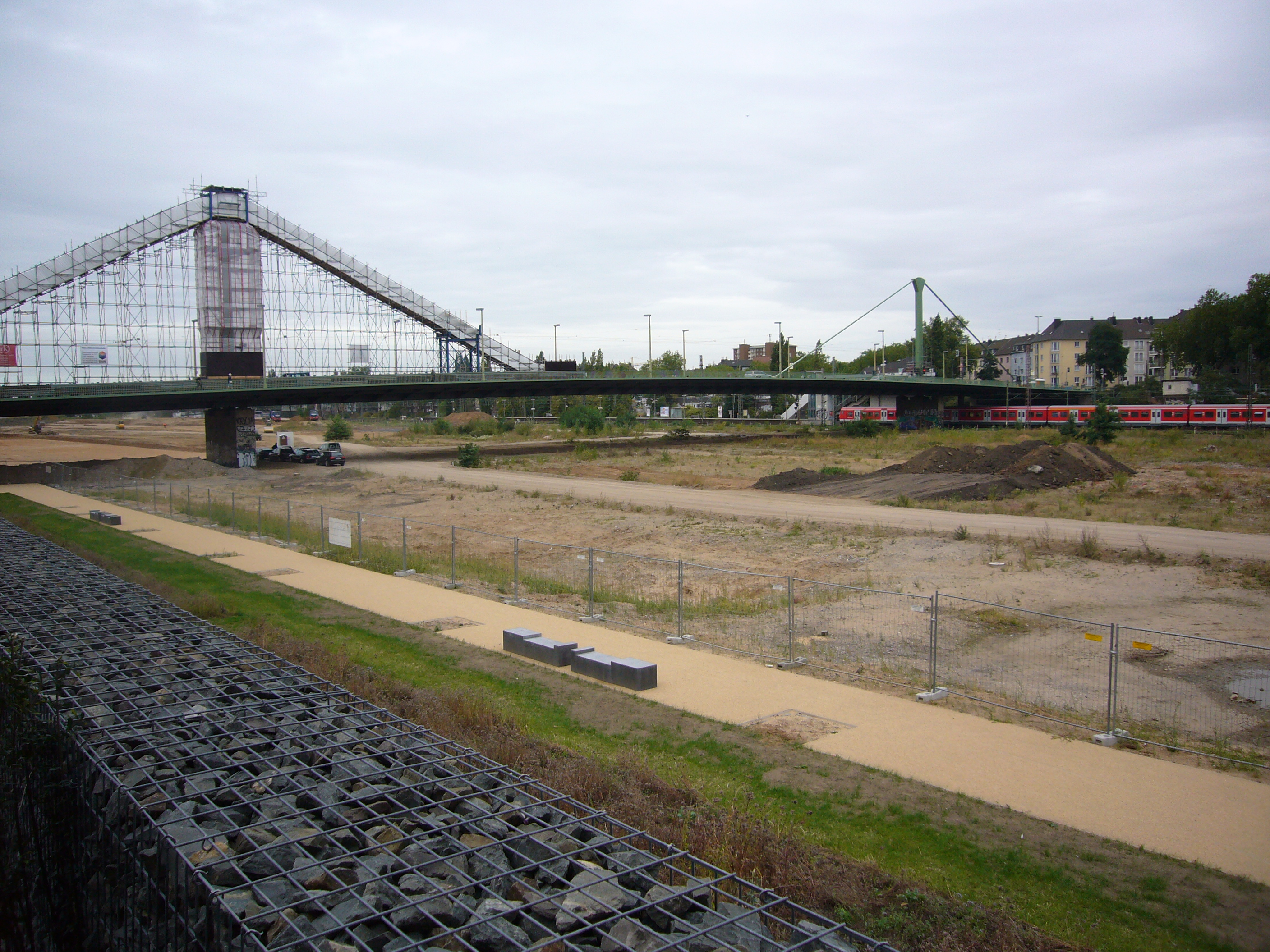 Düsseldorf - Neue Stadtquartiere Derendorf - Abschnitt B - Blick auf Franklinbrücke